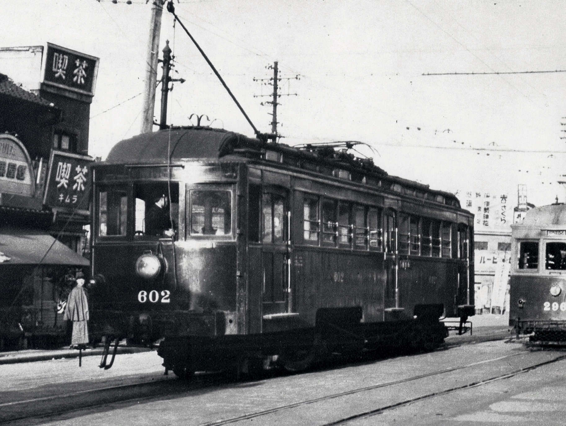 名鉄電車とすれ違う 菊井町付近 昭和14年